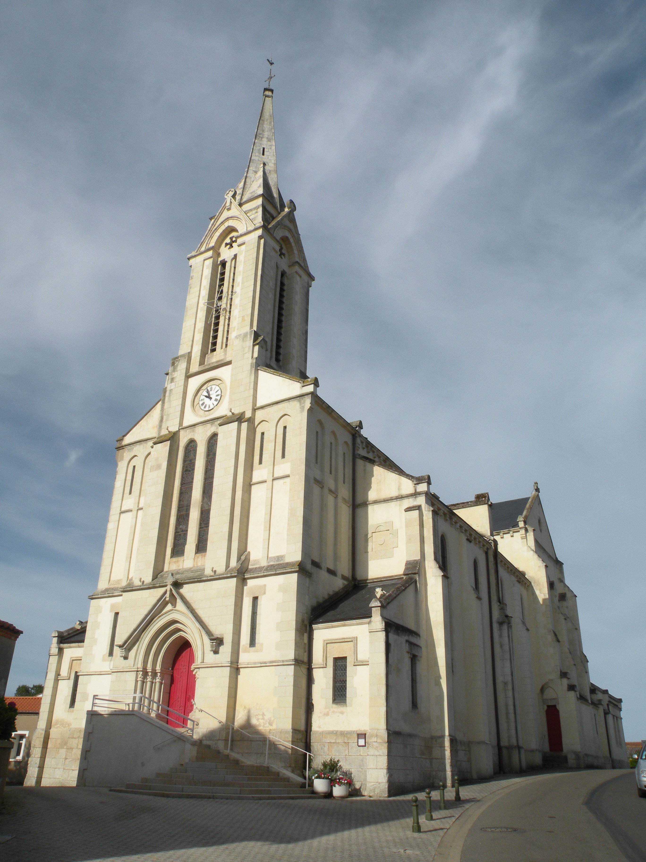 eglise de L'Aiguillon-sur-Vie, vendée 2009-08-21